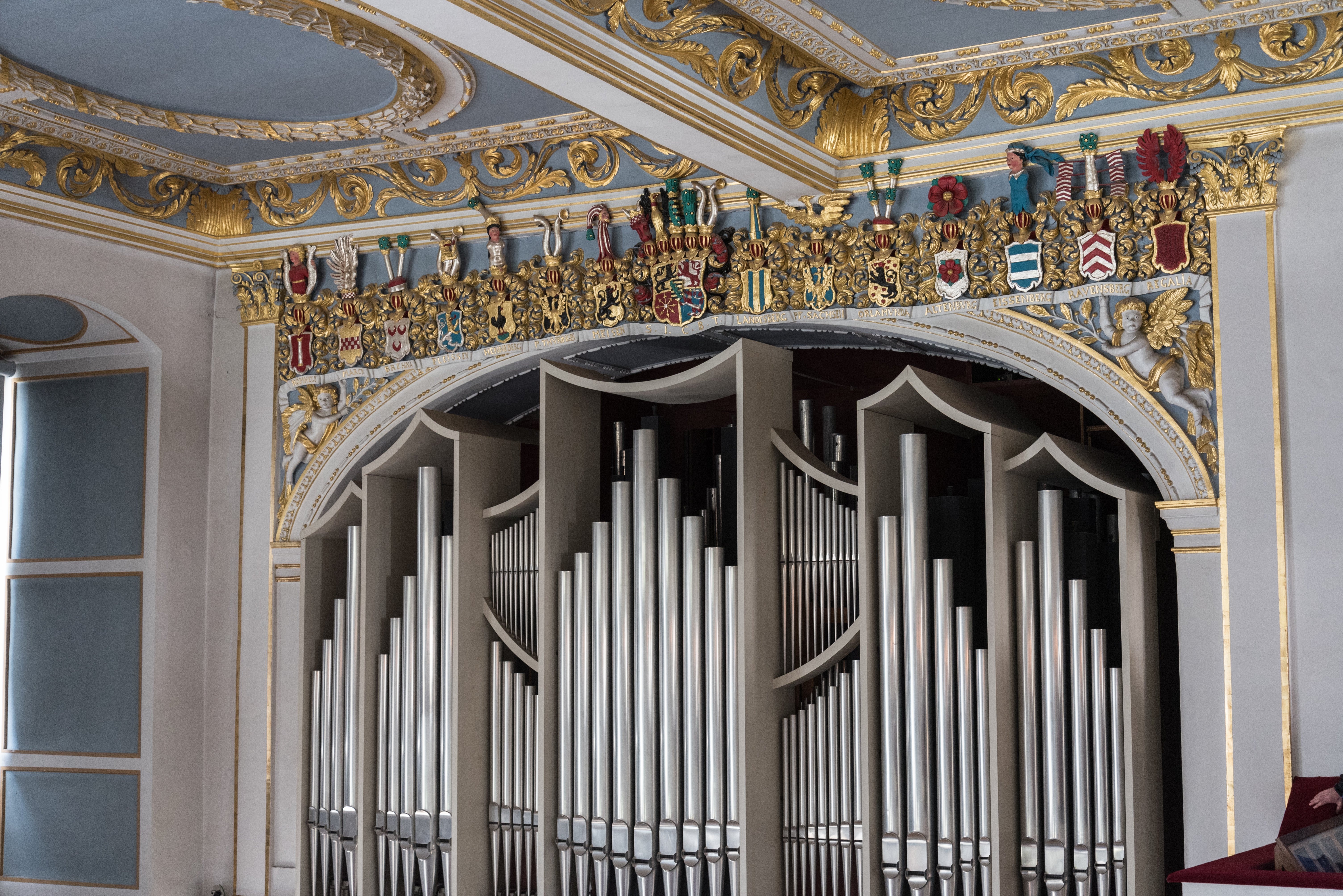 Meiningen, Schloss Elisabethenburg, Interior